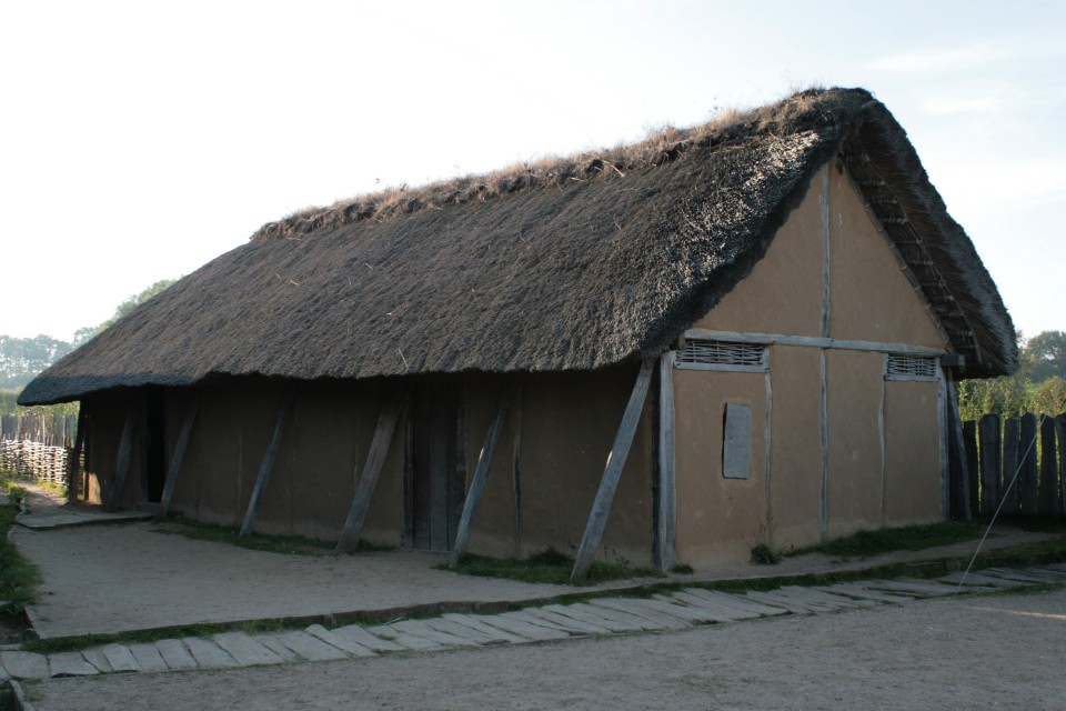 Nachbau Wikingerhaus (gefunden in Haithabu) auf der Freifläche von dem Wikinger Museum Haithabu.